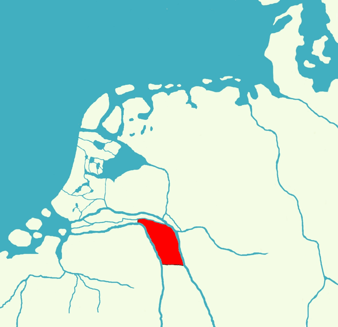 Eigen werk. Ligging van de Hettergouw (Beowulf: Hetware) in het Frankische Rijk. Gemaakt door Sindala op 28 maart 2007.